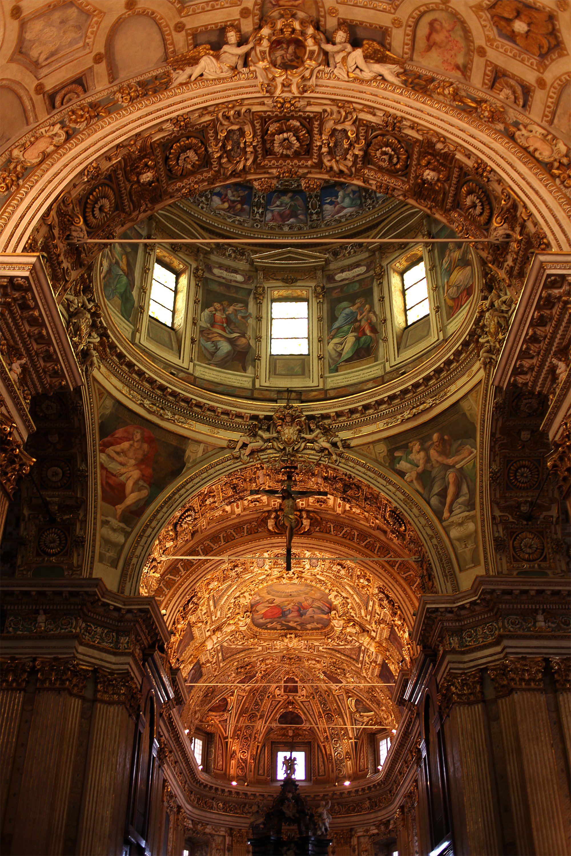 Chiesa di San Vittore al Corpo, Milano, veduta della cupola